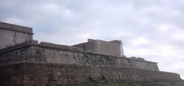 Forte do Pessegueiro This file was uploaded for Wiki Loves Monuments in Portugal with the unique identifier 74610.